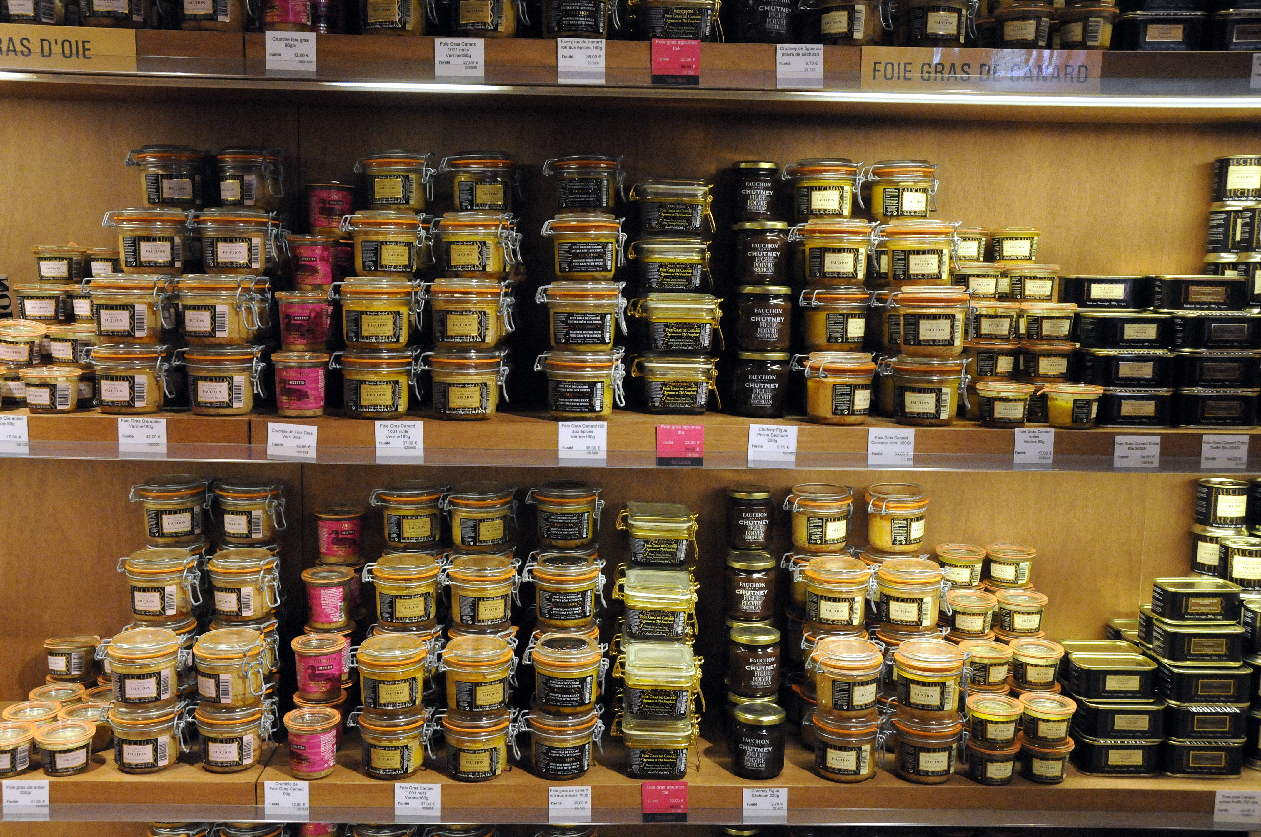 Fauchon